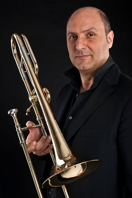 with the new Schagerl"Fontana" trombone